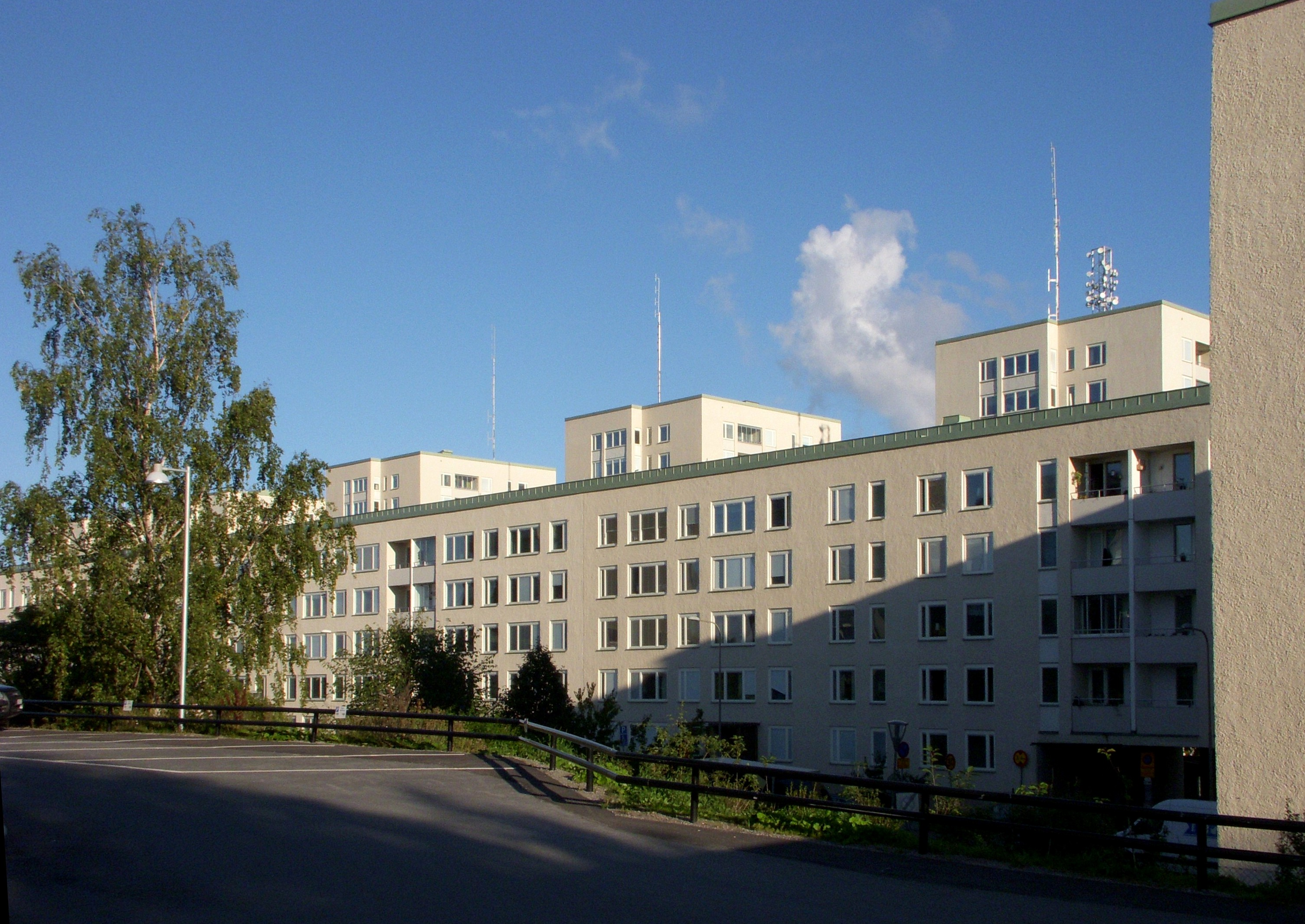 Bebyggelsen på Nybohovsbacken